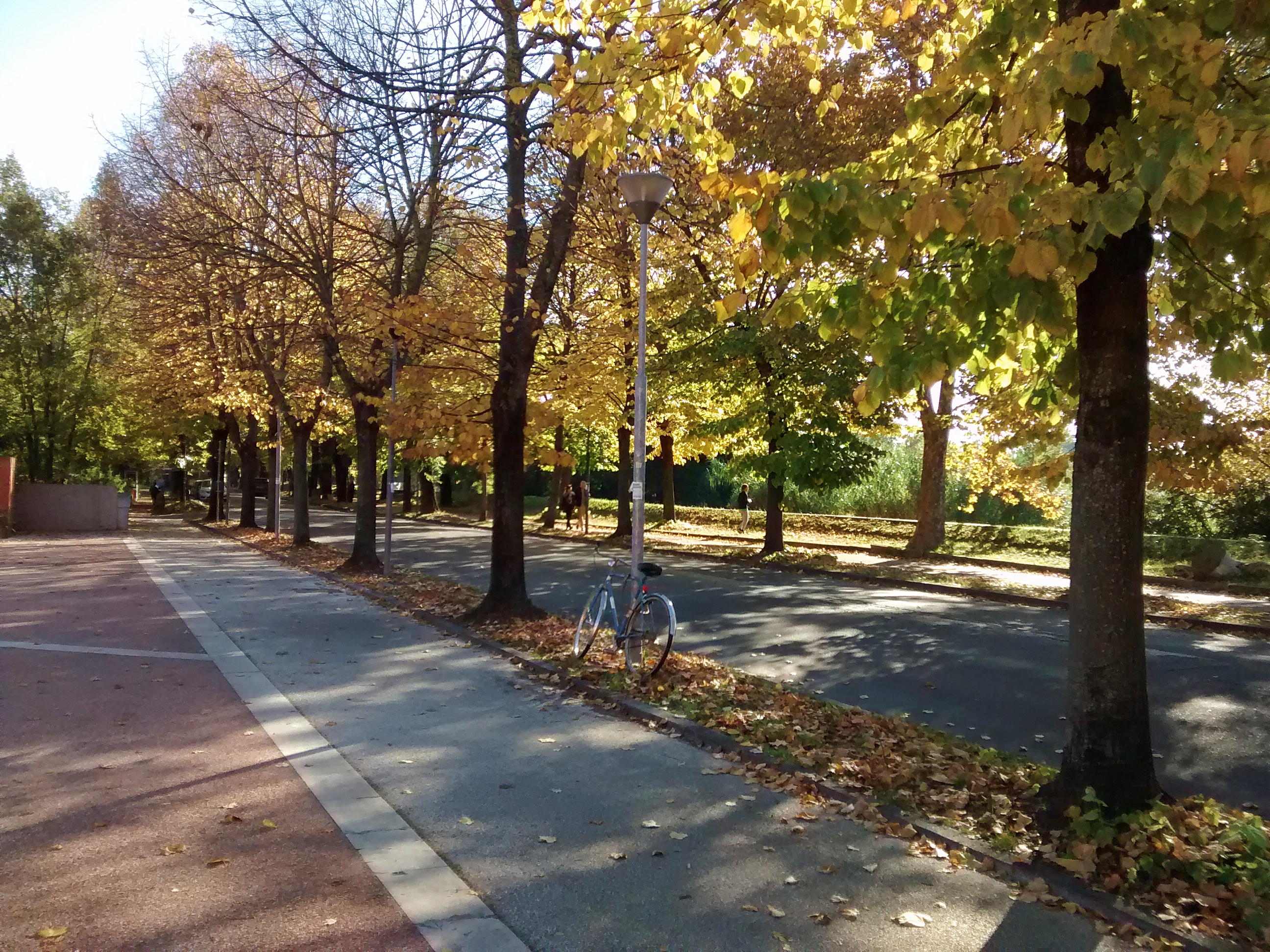 Viale delle Piagge presso il centro espositivo SMS.